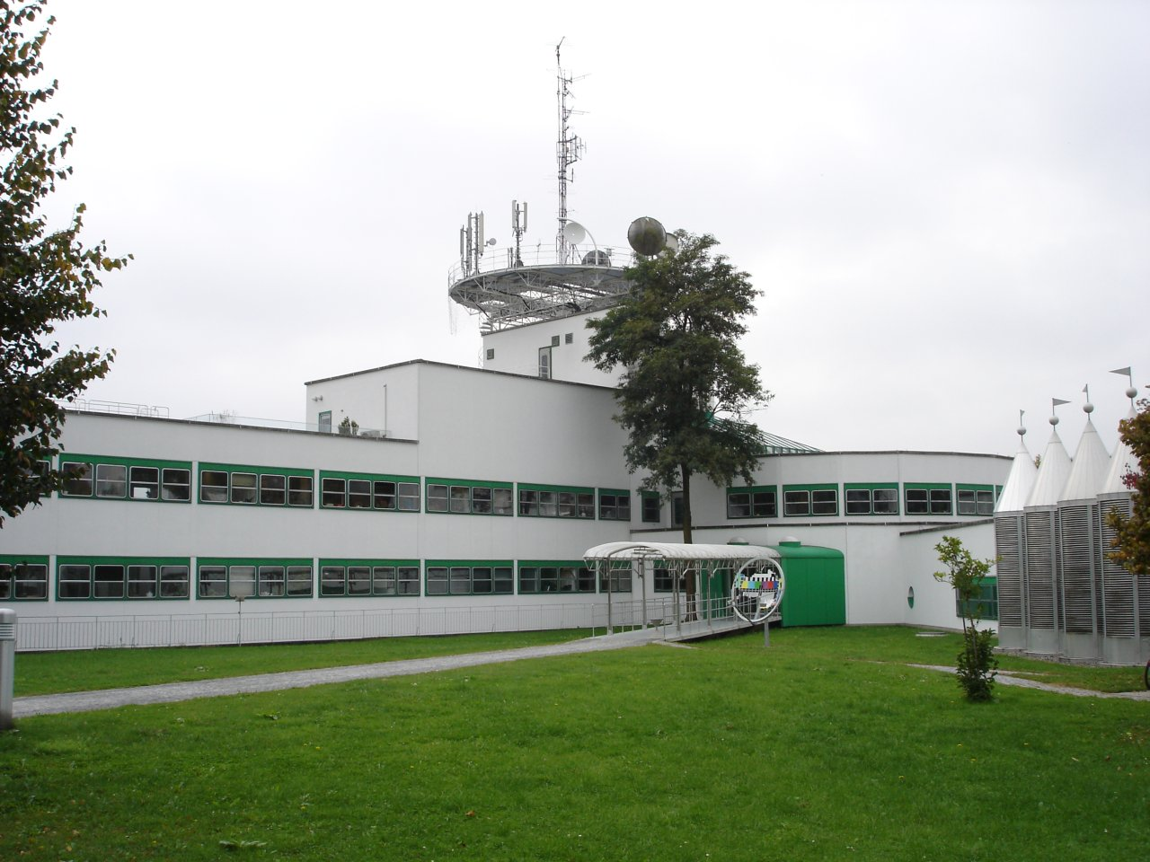 ORF Landesstudio Steiermark /Austria